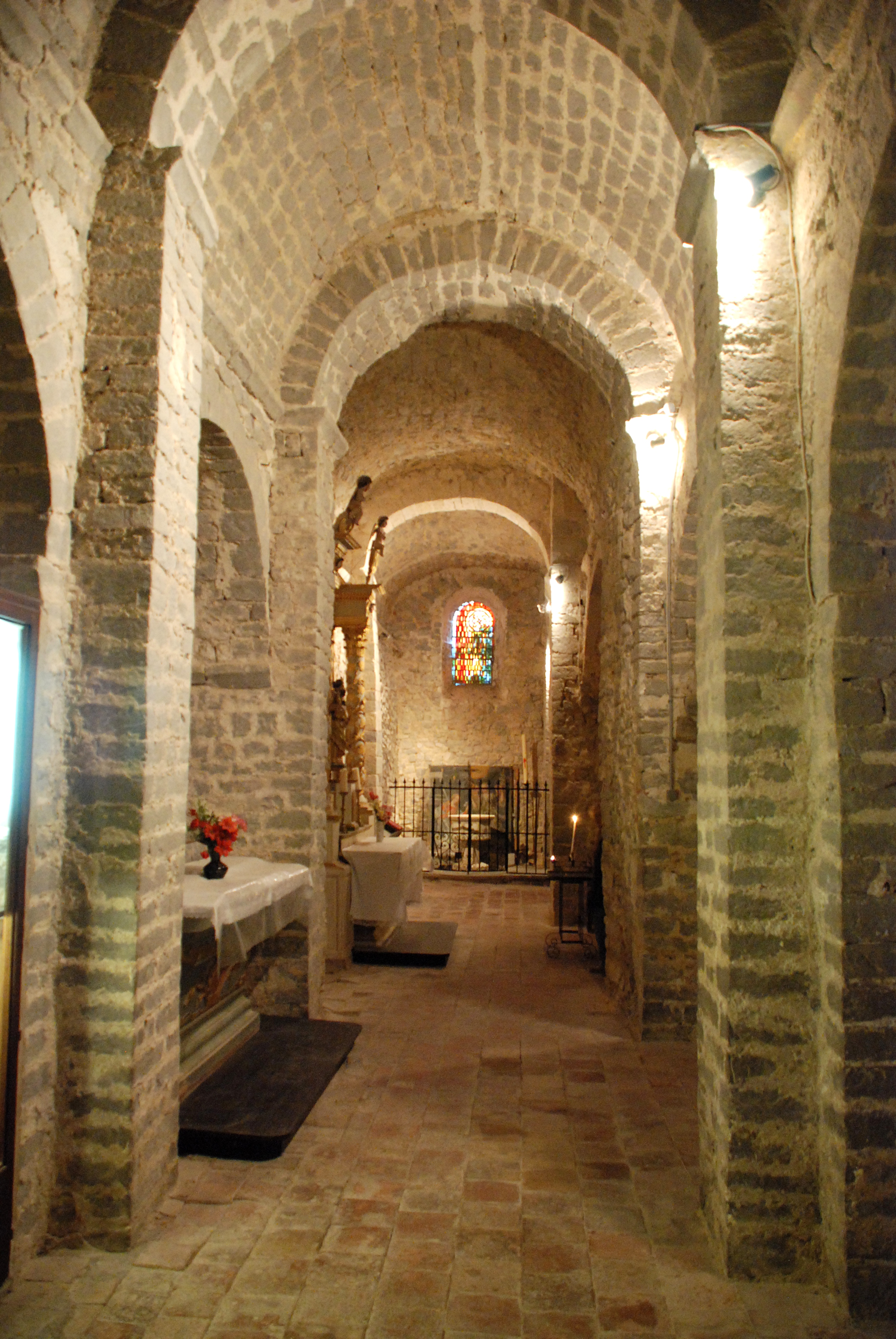 France - Provence - Var - Saint-Julien-le-Montagnier